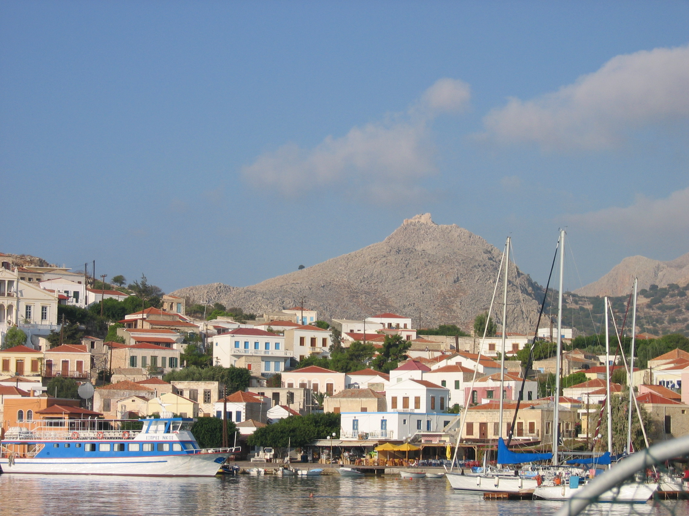 Nimborióta.